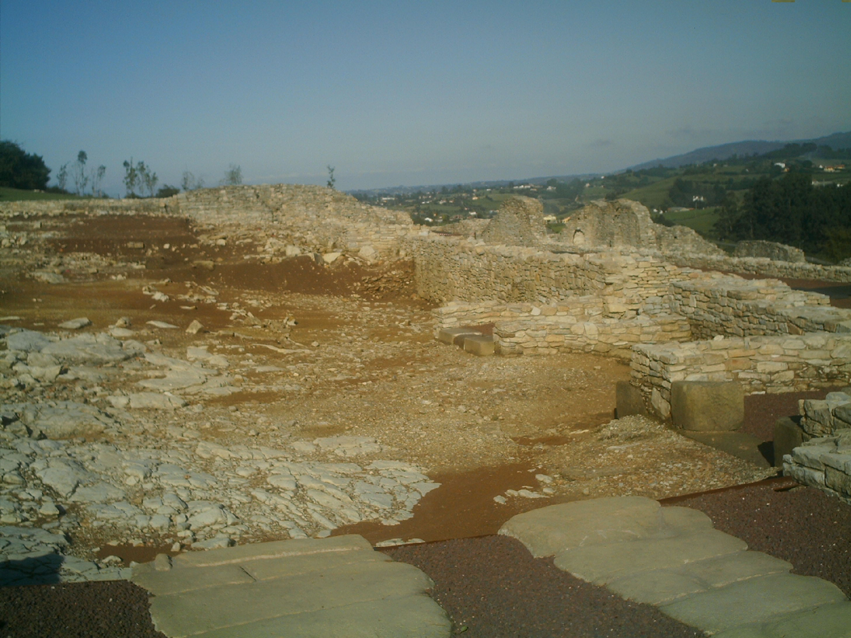 Vista General de la Villa Romana de Veranes (Cuneso, Gijón)